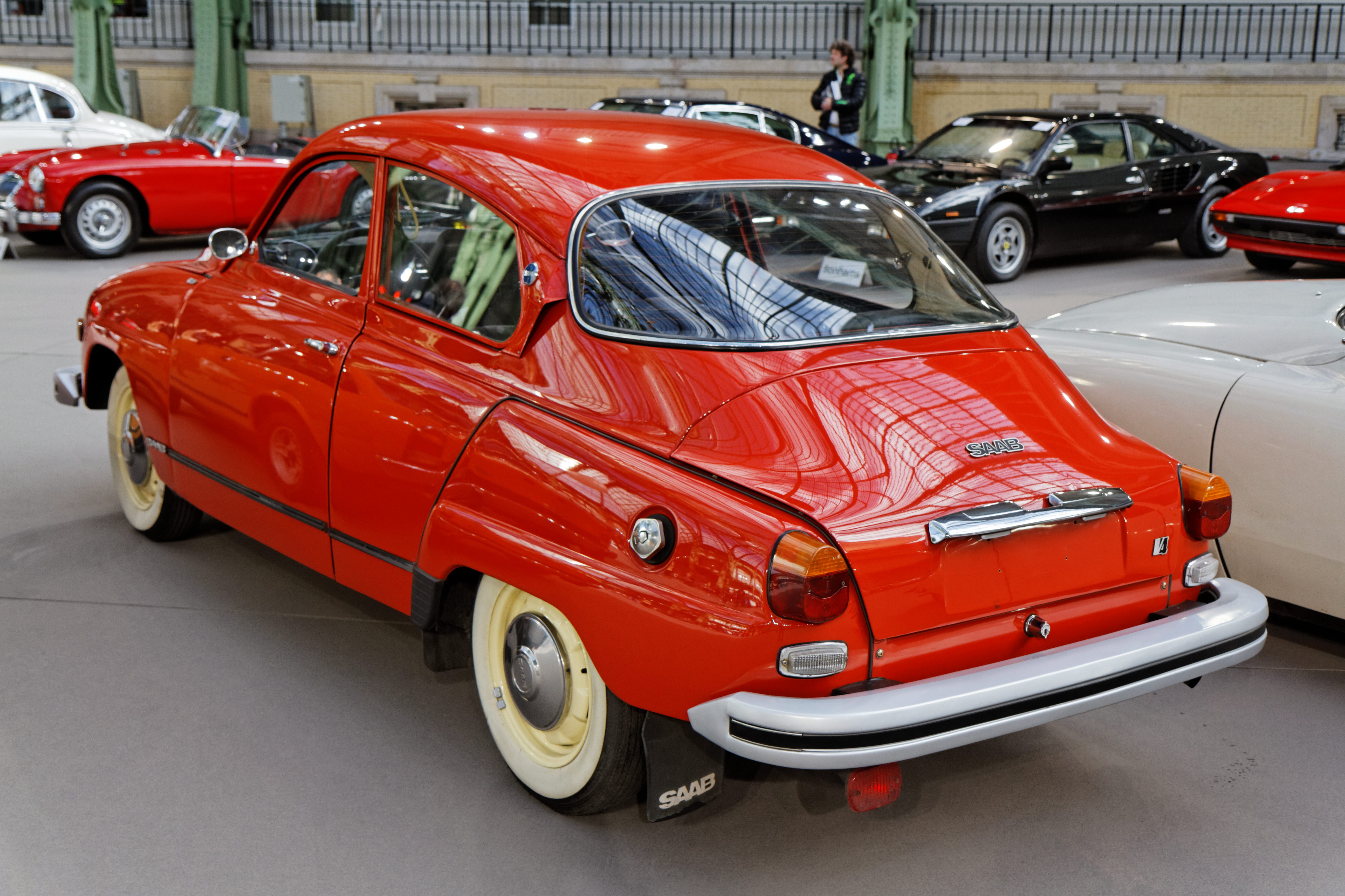 Une SAAB 96L Saloon au Grand Palais lors de la vente Bonhams en février 2014.